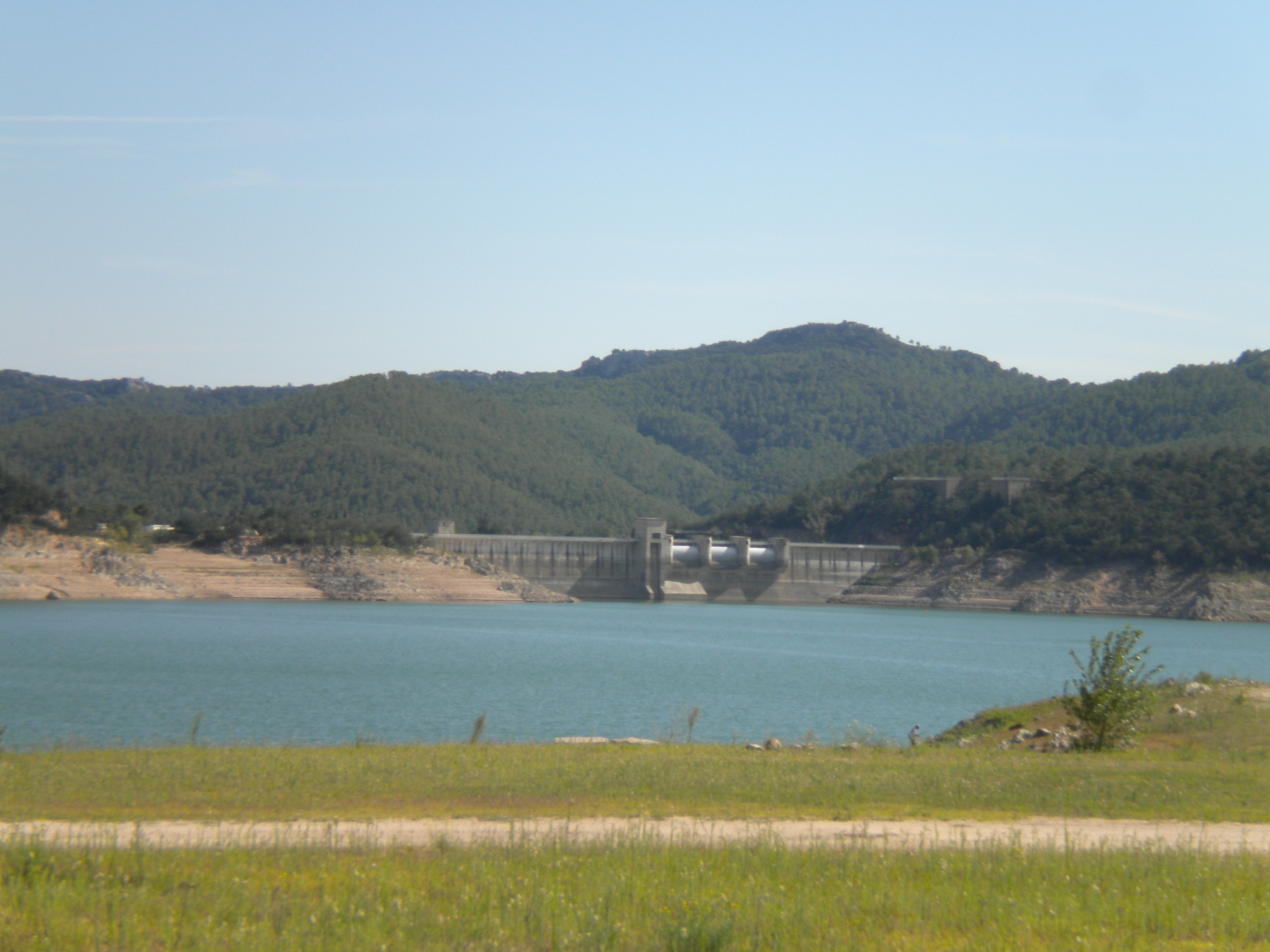 Embassament de Boadella, al municipi de Darnius (Alt Empordà)